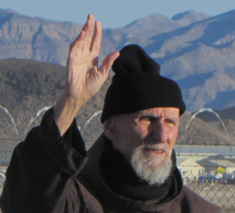 Padre Louis Vitale